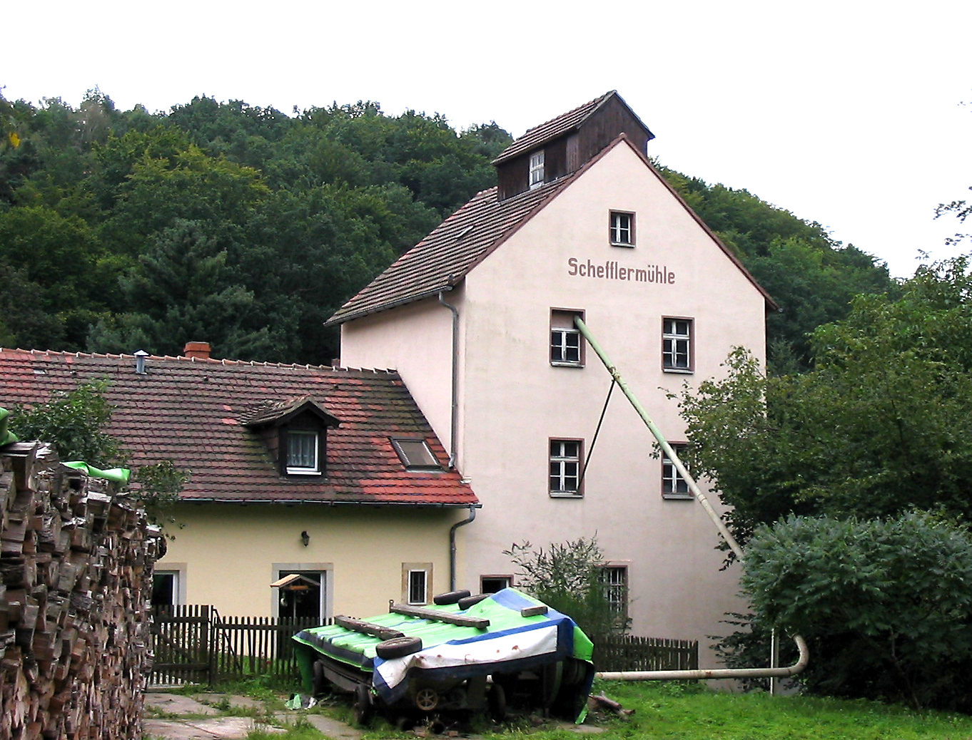 Radebeul, Die Schefflermühle im Lößnitzgrund